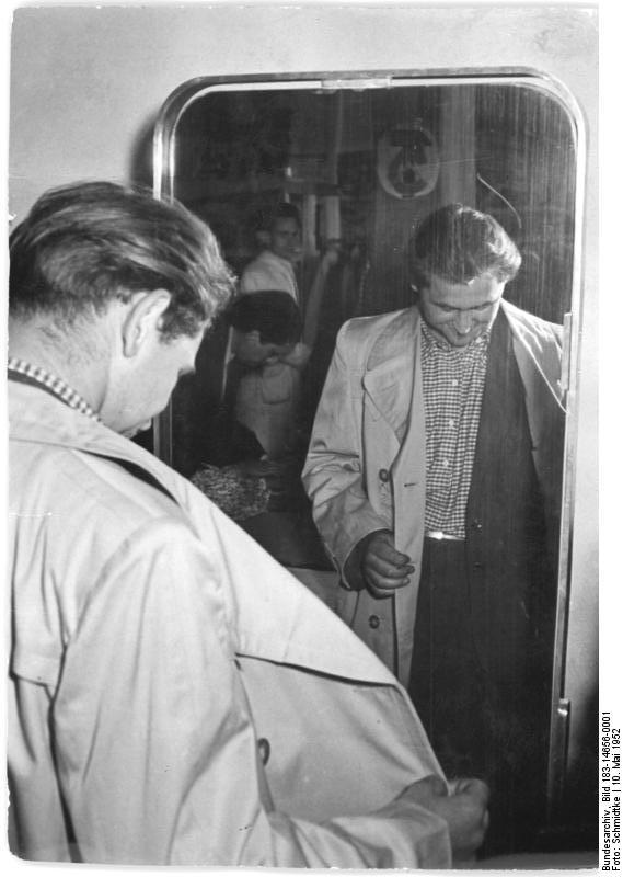 Eisenhüttenstadt Zentralbild Schmitdtke 10.5.1952 Verkauf von Ho- Industriewaren im EKO. Besonders unsere Werktätigen in den Schwerpunktbetrieben haben ein Recht darauf, gut und ausreichend mit Industriewaren versorgt zu werde, weil durch ihren Einsatz in der Produktion die Möglichkeiten für ein immer besser werdendes Warenangebot geschaffen werden. So verkaufte die Zentrale Leitung der Ho am 9.5.1952 im Einsenhütten-Kombinat Ost in Fürstenberg(Oder) Industrie-Waren und will diesen Verkauf regelmässig alle 6 Wochen durchführen. Die Kollegen des EKO wurden durch Handzettel und Plakate auf den Verkauf hingewiesen und aufgefordert, ihre Wünsche, Kritiken und Verbesserungsvorschläge einzureichen. UBz: Lokführer der Eisenbahn des EKO Günther Kanzler freut sich über den soeben gekauften Popeline-Mantel.